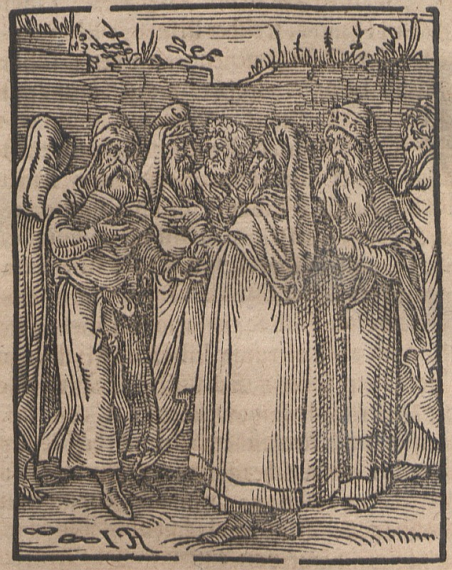 Original image description from the Deutsche FotothekStändebuch & Beruf & Theosoph & Kabbala